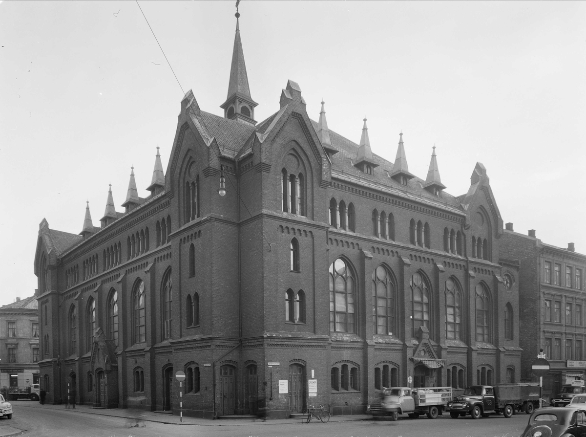 Calmeyergatens Misjonshus var et forsamlingslokale for evangeliske møter i Hausmannskvartalene i Oslo. Det ble revet i 1972.